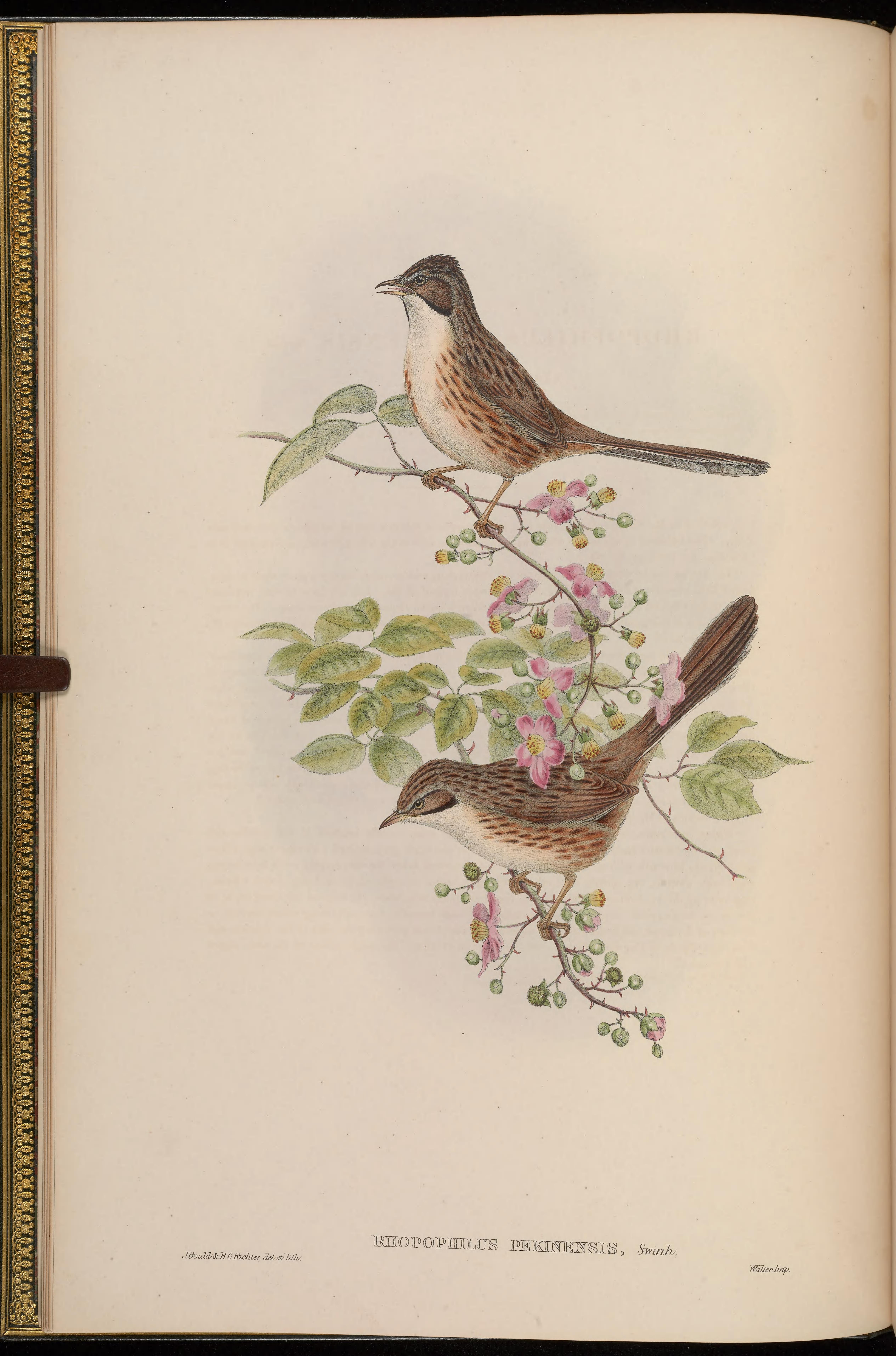 Rhopophilus pekinensis